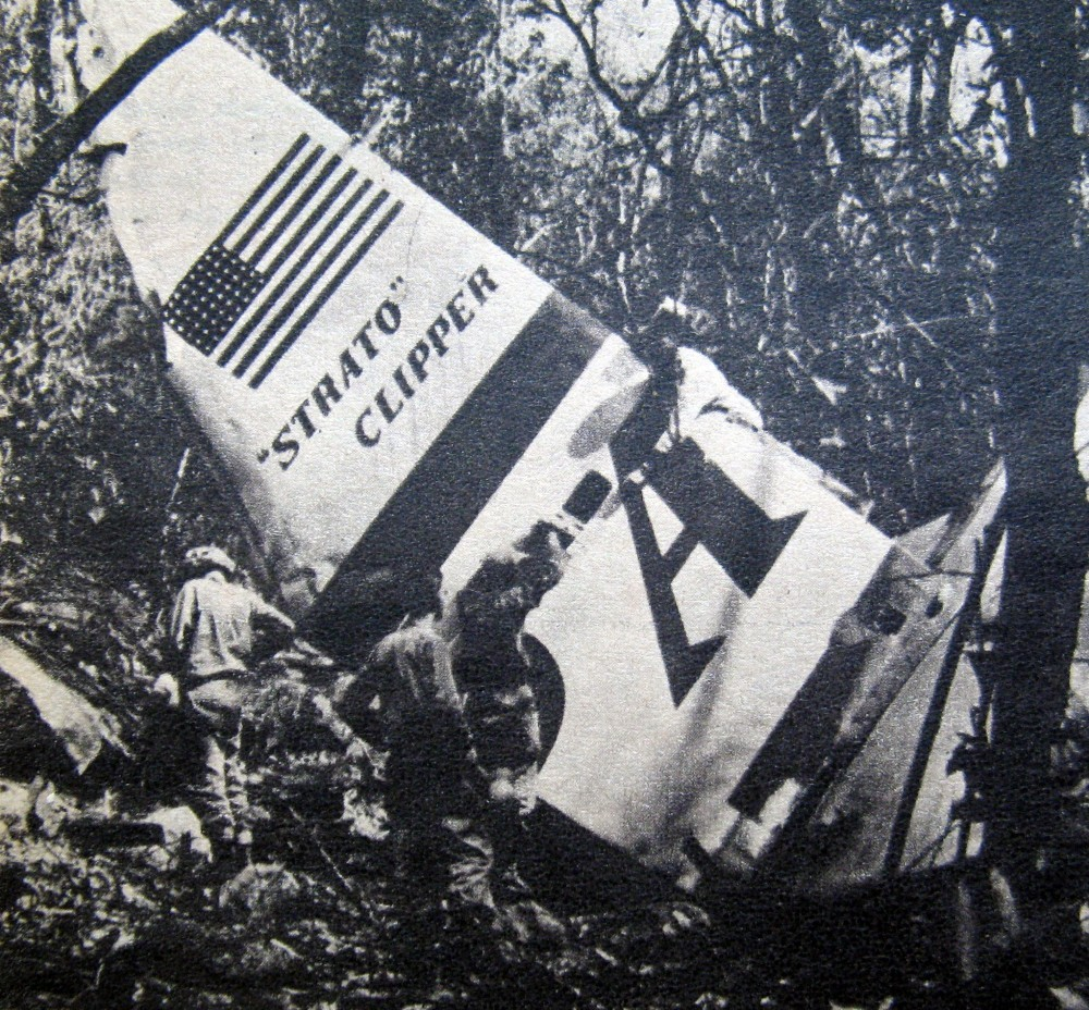 パンアメリカン航空202便は1952年4月29日に墜落事故を起こし、50人が死亡した。